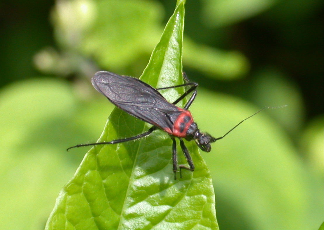 Reduvius humeralis：クビアカサシガメ 2008/06/01 和歌山県田辺市：Tanabe City. Wakayama Pref. Japan